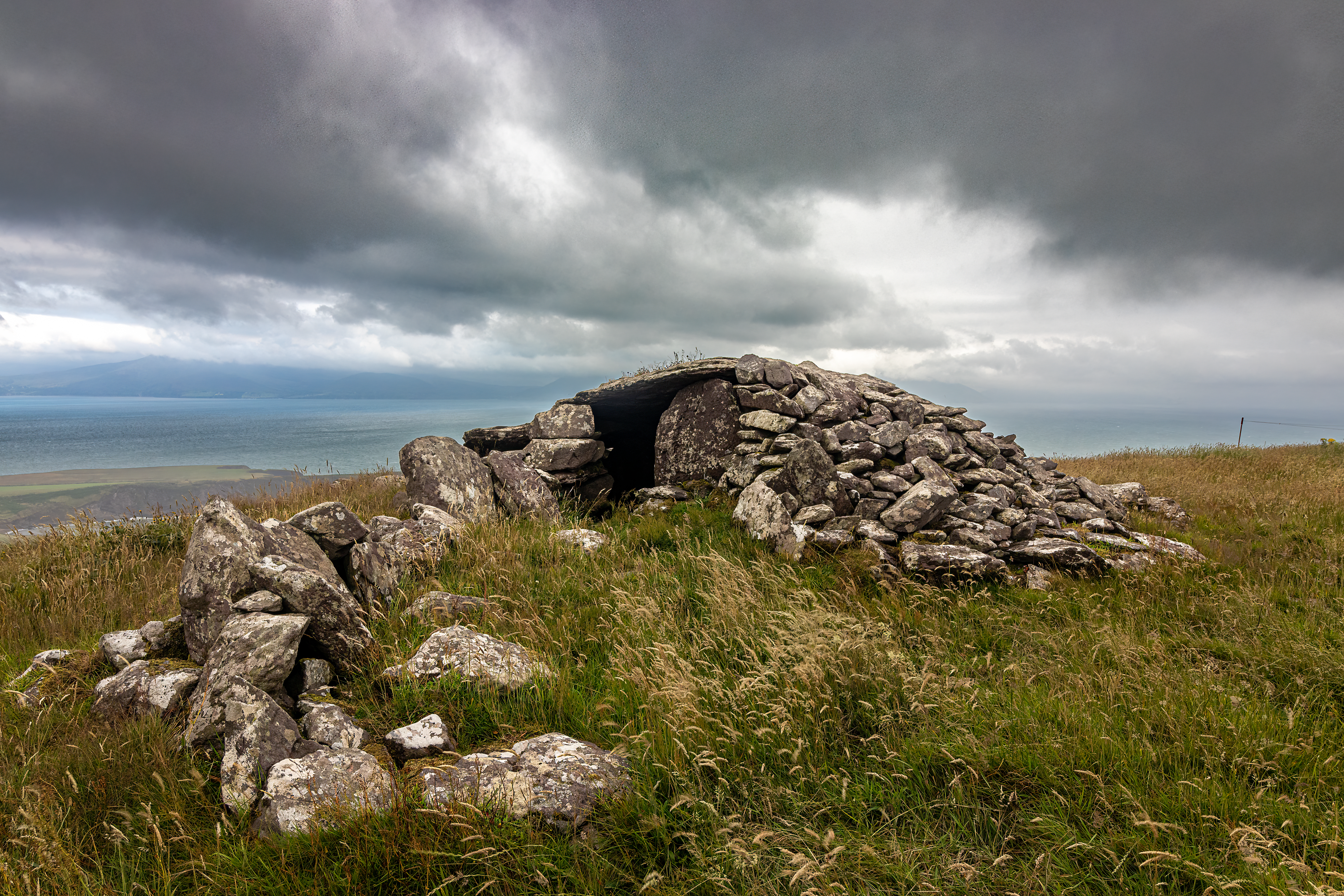 Wedge Tomb von Doonmanagh